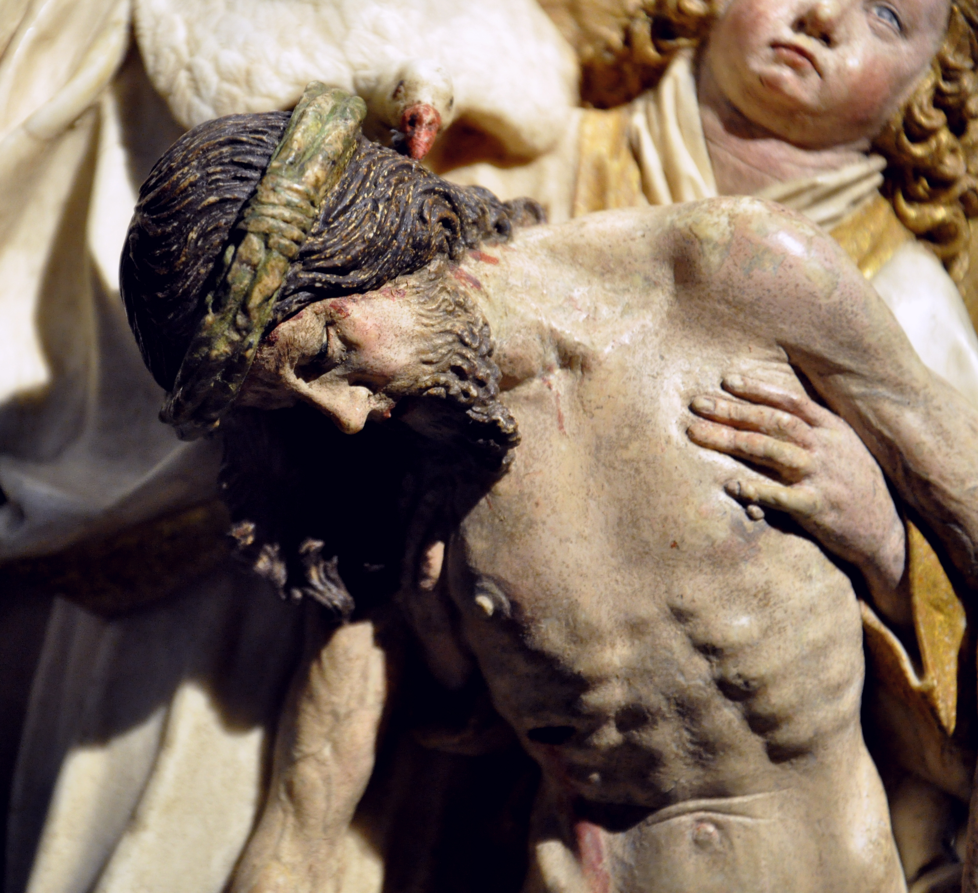 Hans Multscher: Heilige Dreifaltigkeit, Ulm um 1430; Alabaster, barock ergänzt, originale Farbfassung, übergangen; 28.5 cm Liebieghaus, Frankfurt am Main, Inv. Nr. St.P. 401 Weblink